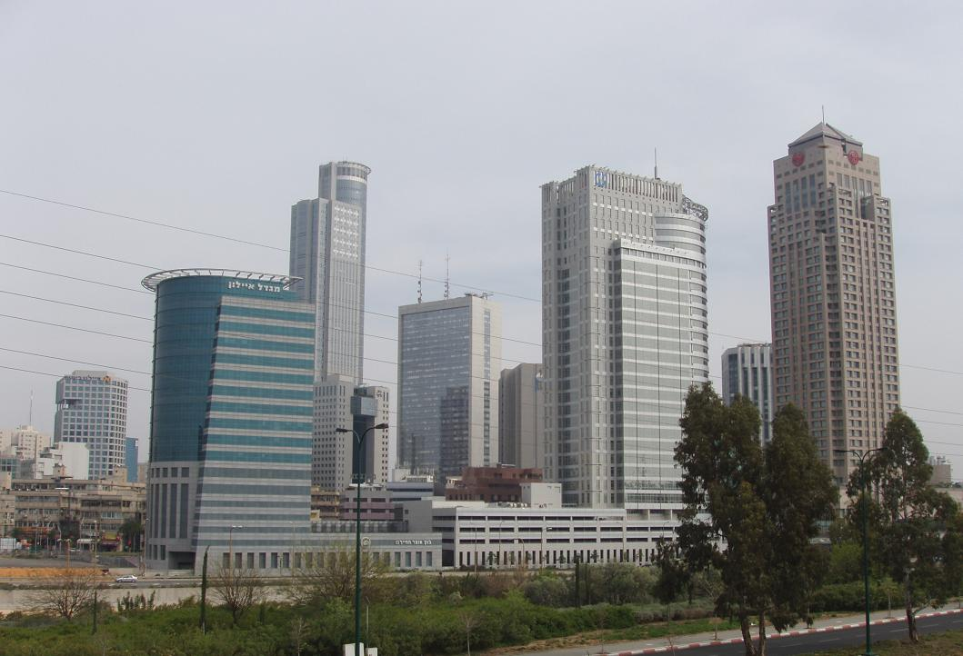 מתחם הבורסה ברמת גן, מבט מצפון מערב. צילם דוד שי